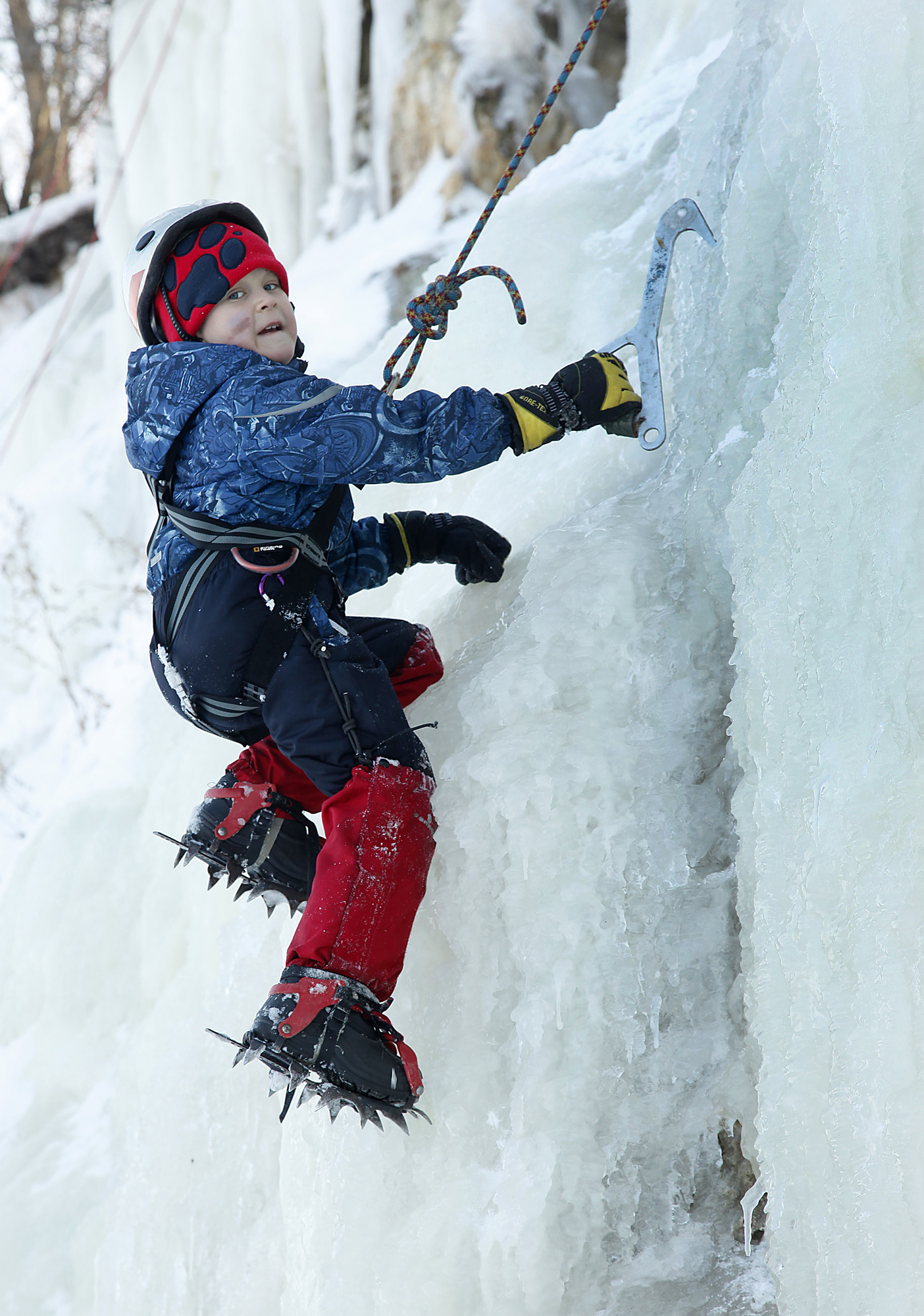 Uko Nõulik juunior, alpinist 2013